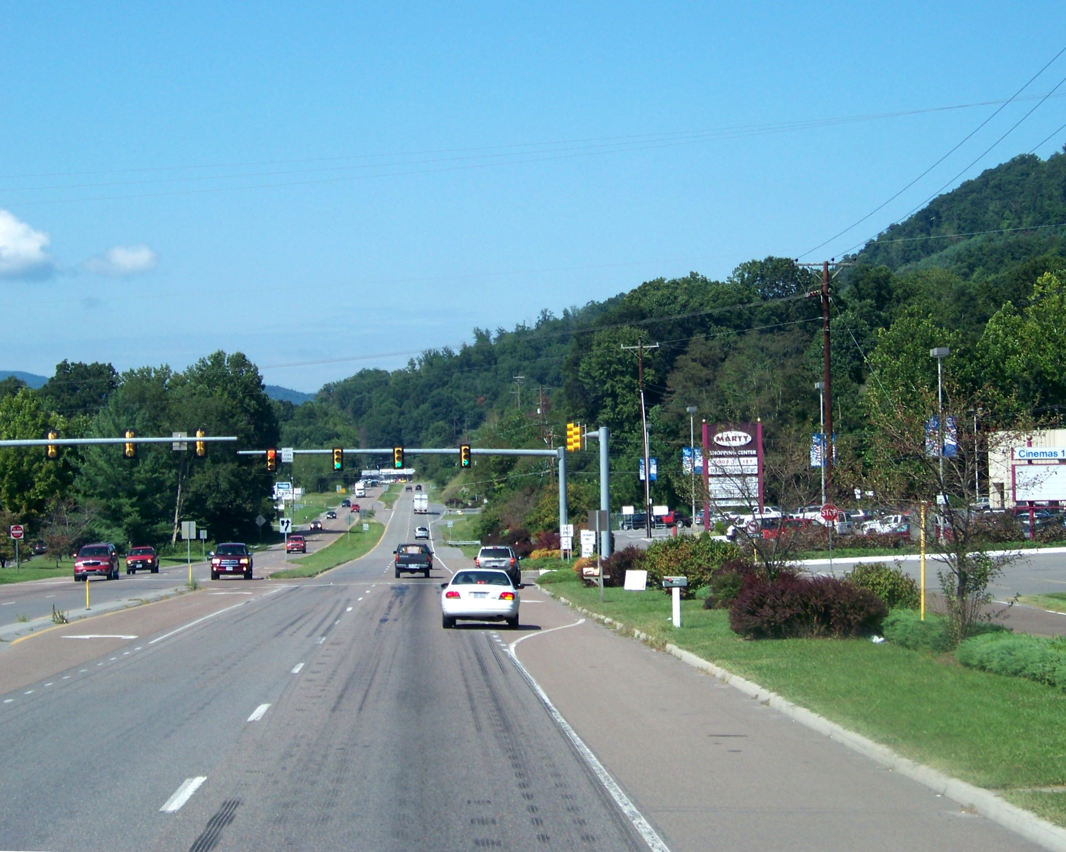 Coeburn, VA 24230, USA